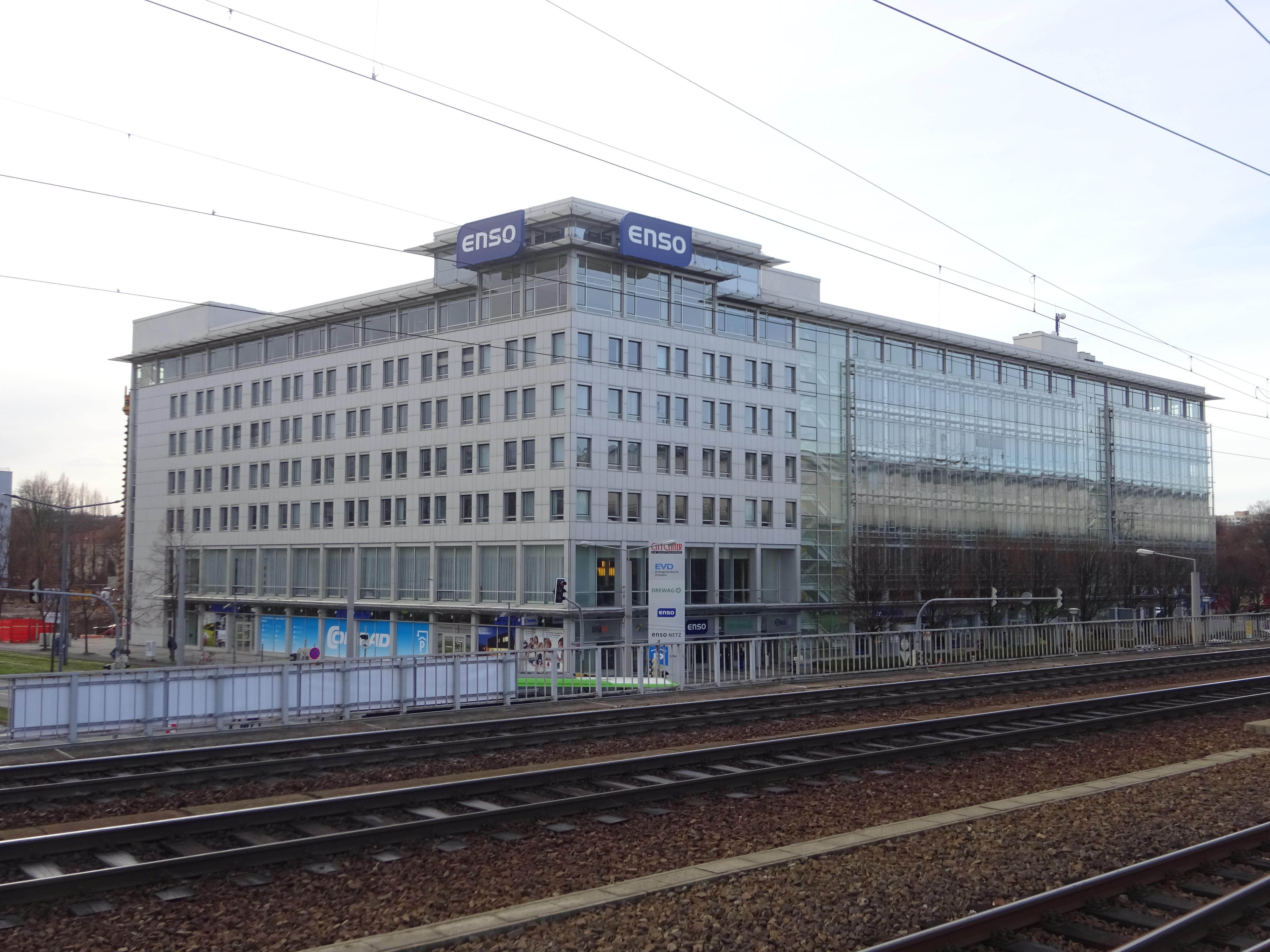 Hauptsitz des Energieversorgers ENSO incl. "City-Center" am Friedrich-List-Platz in Dresden, Blick von den Hochgleisen des Hauptbahnhofs, am linken Bildrand sind beginnende Bauarbeiten zur Erweiterung des Firmensitzes erkennbar; Dezember 2019